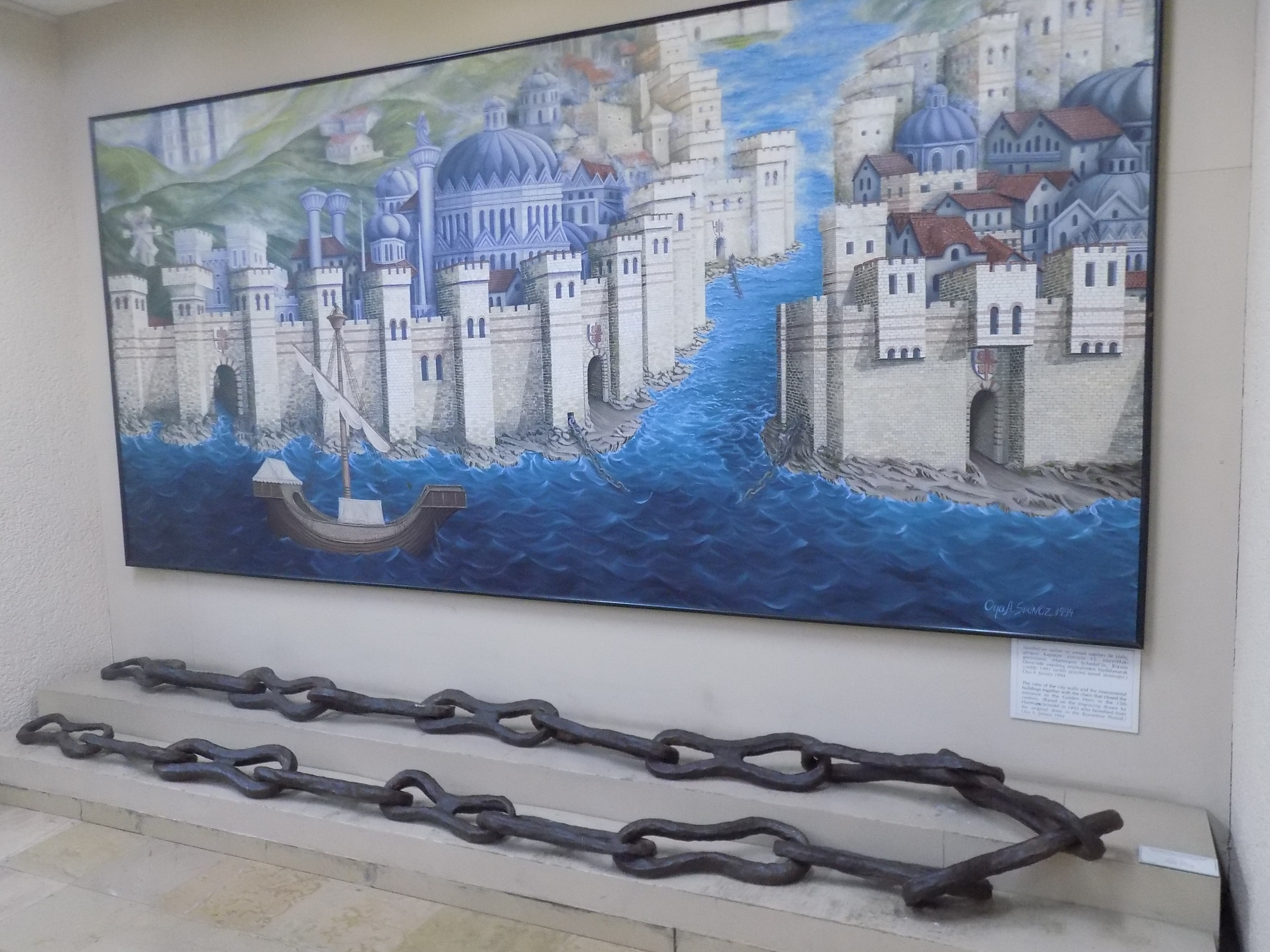 İstanbul'un fethi sırasında Haliç'e çekilen zincir.